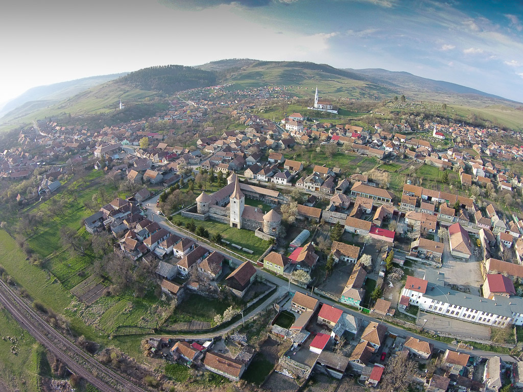 Cetatea Bethlen_Racos (judetul Brasov) - vedere aeriana